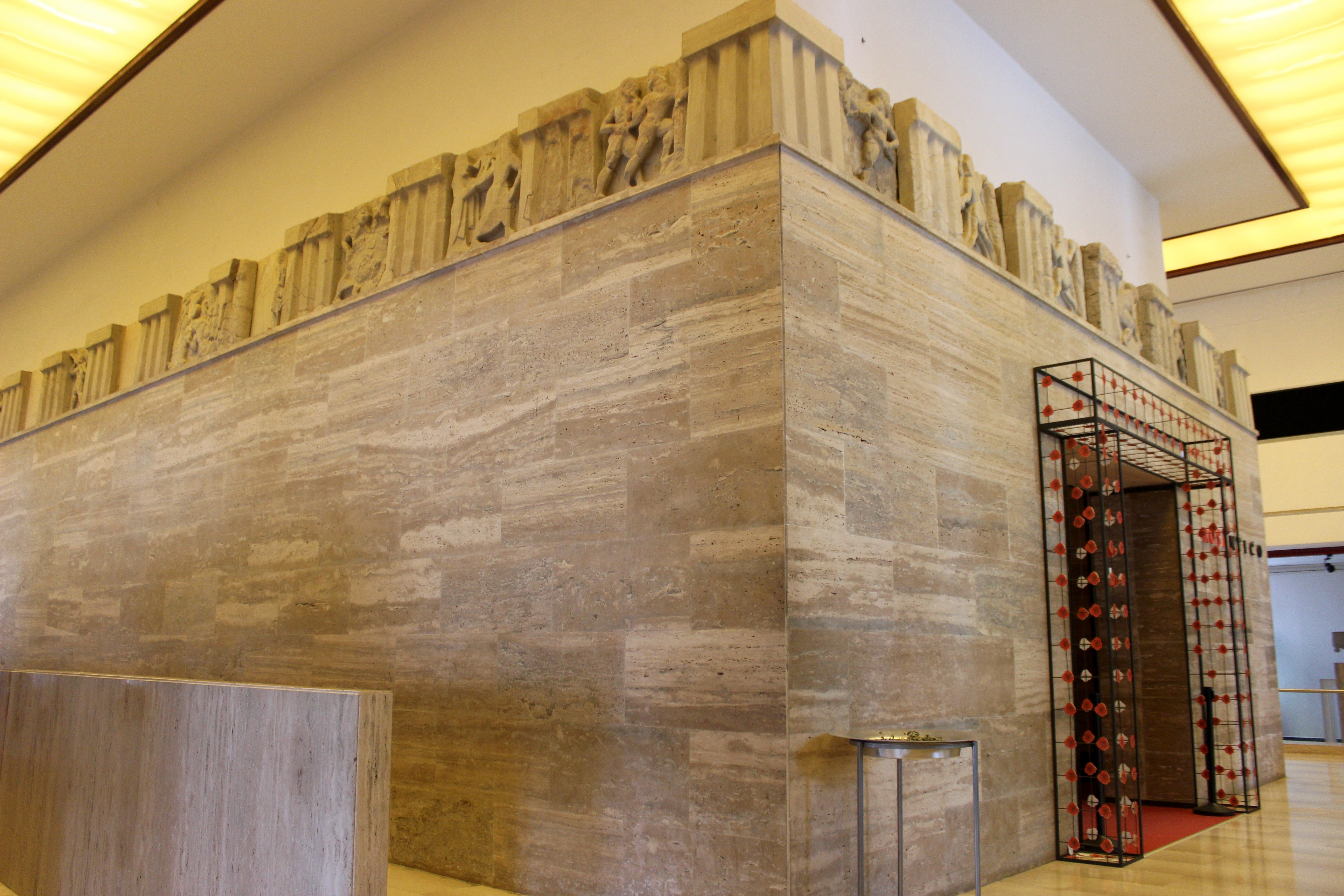 Paestum. Museo Archeologico Nazionale. Metopas del templo de Hera en la desembocadura del Sele en la reconstrucción del denominado Thesauros.